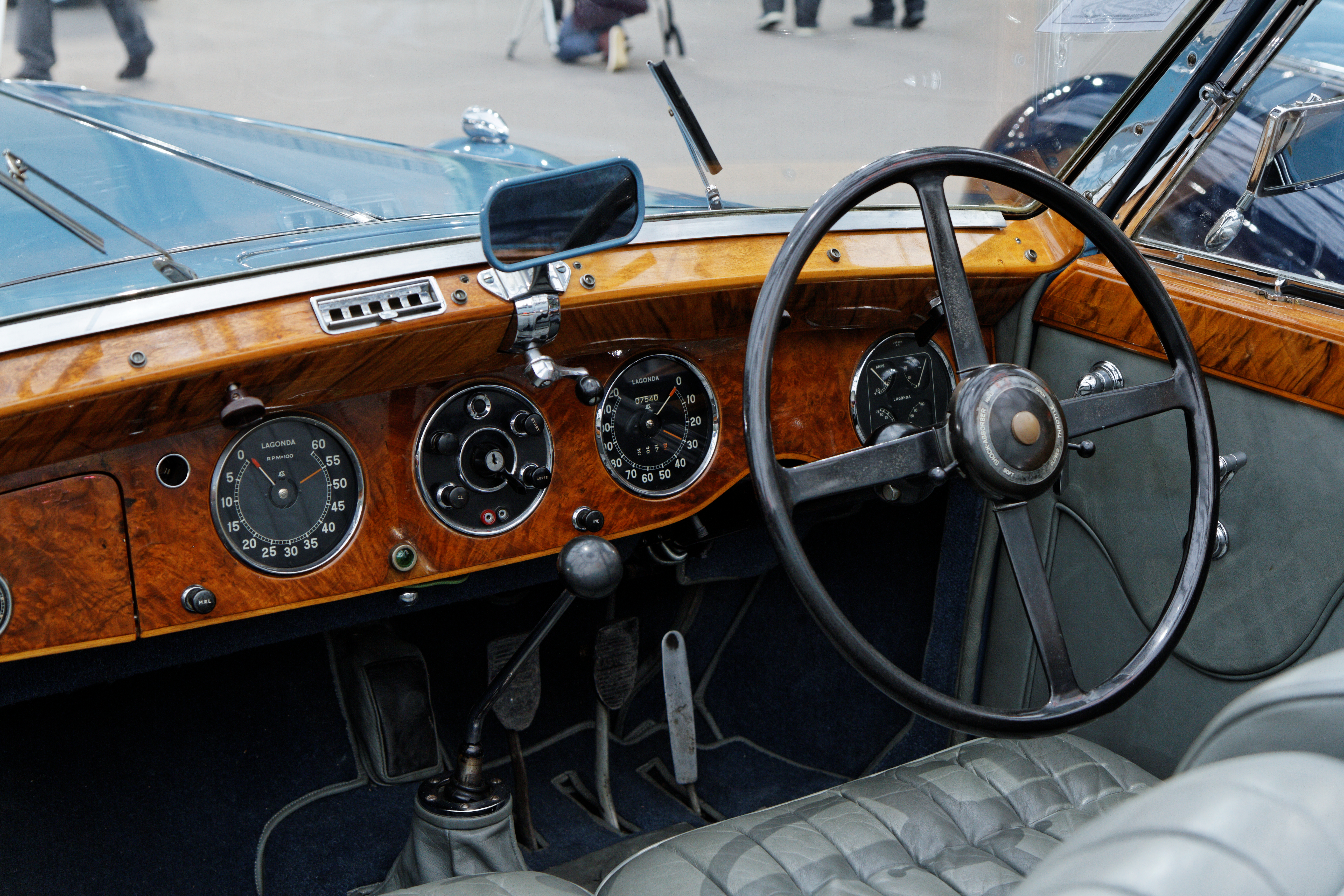 Une Lagonda V12 Drophead Coupé au Grand Palais lors de la vente Bonhams en février 2014.